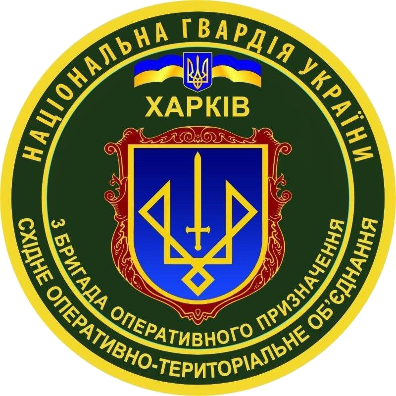 Нарукавний знак, 3-тя окрема бригада оперативного призначення, Національна гвардія України